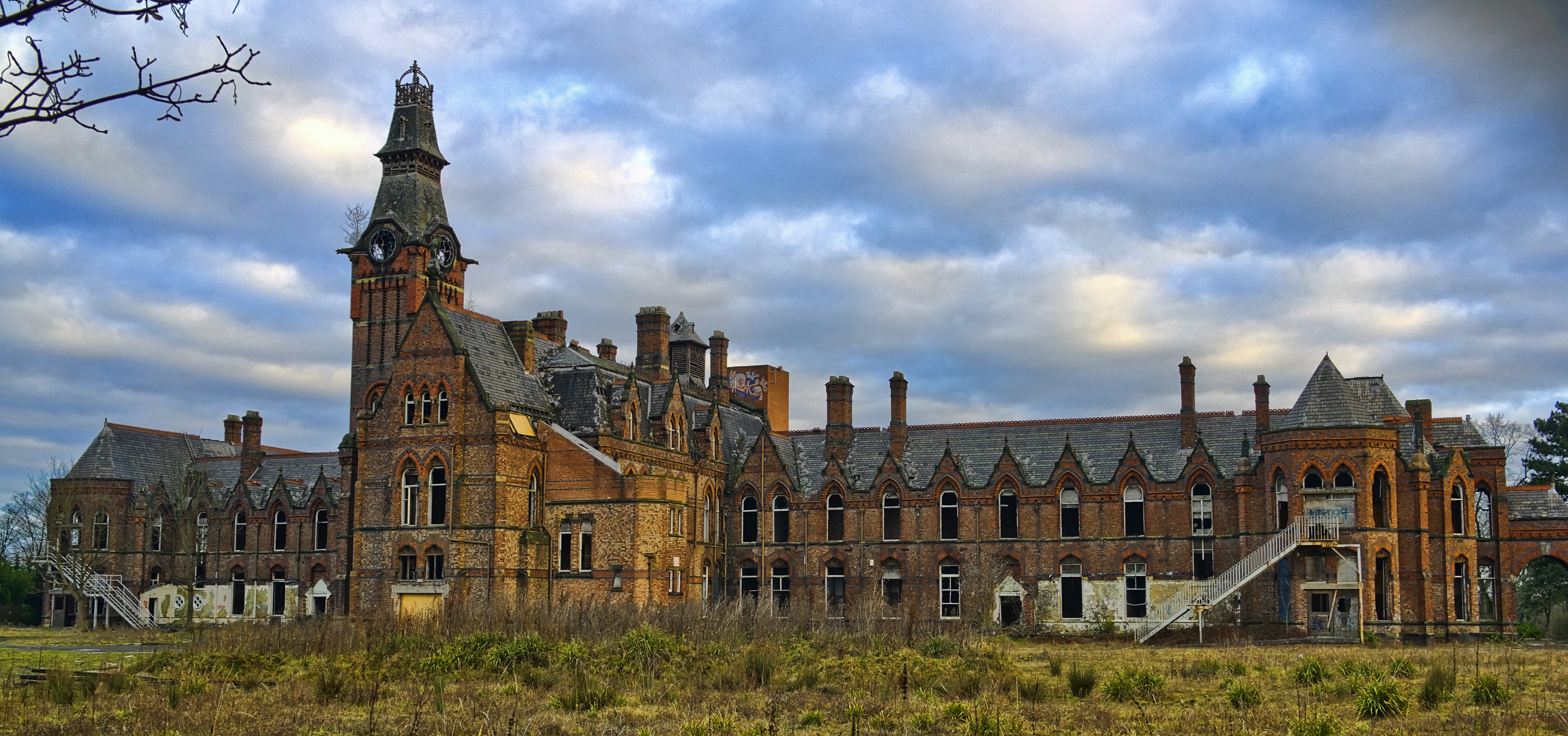 HDR image taken at -2.6,0+2.6